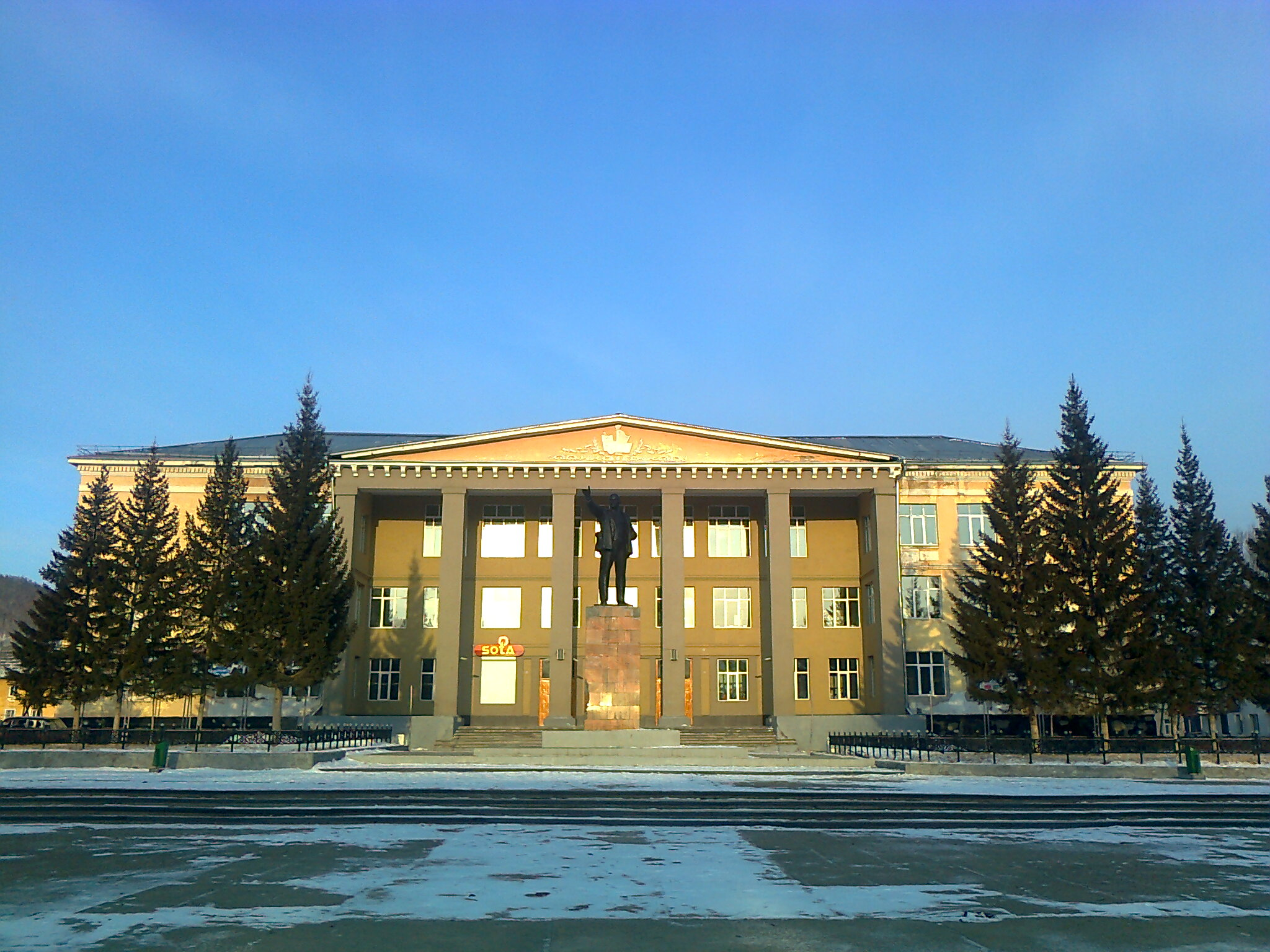 Дворец культуры на главной площади города Закаменск